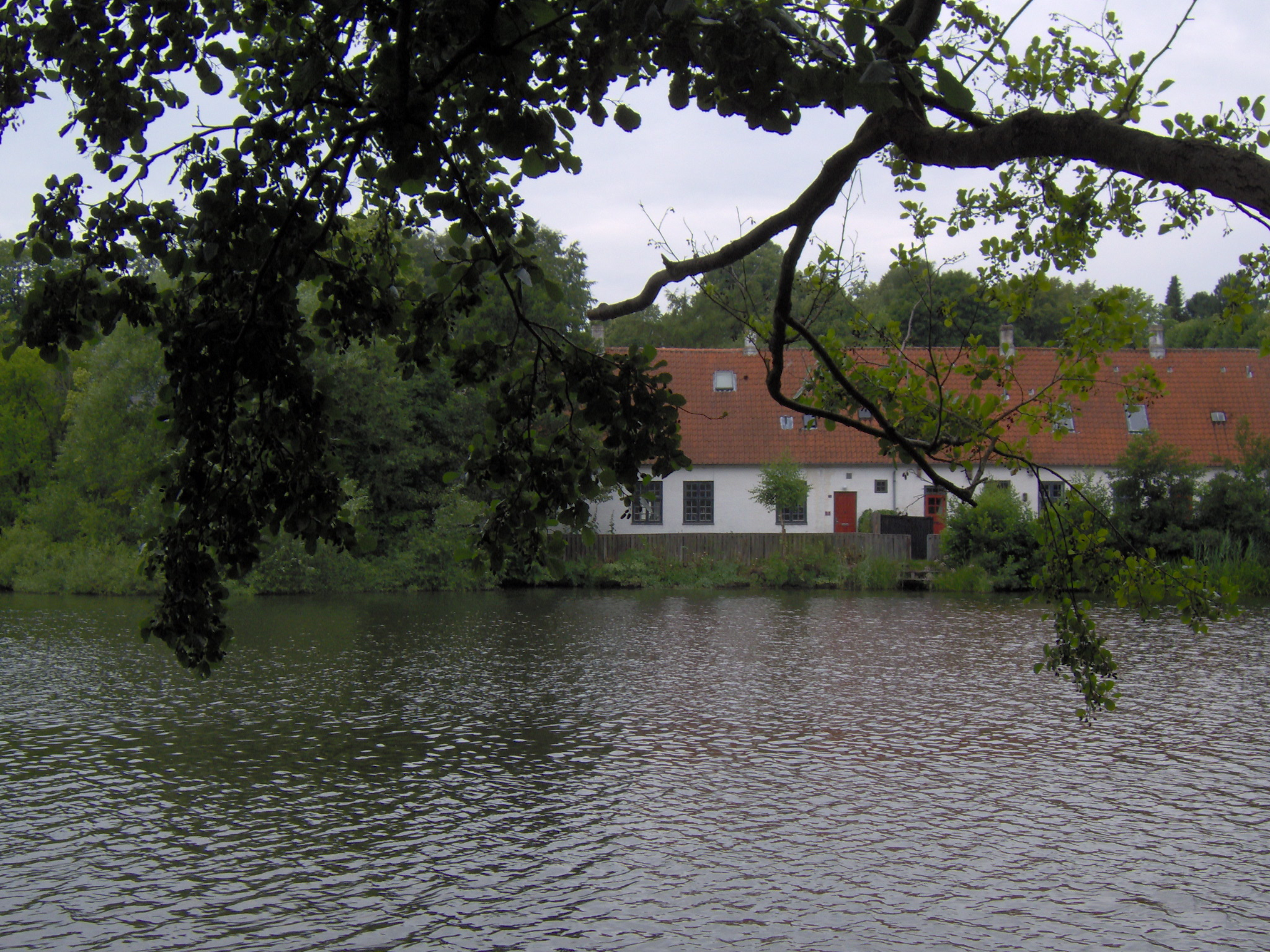 Mesterlængen, Brede Værk